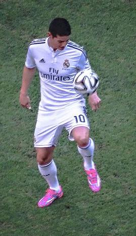 James Rodriguez